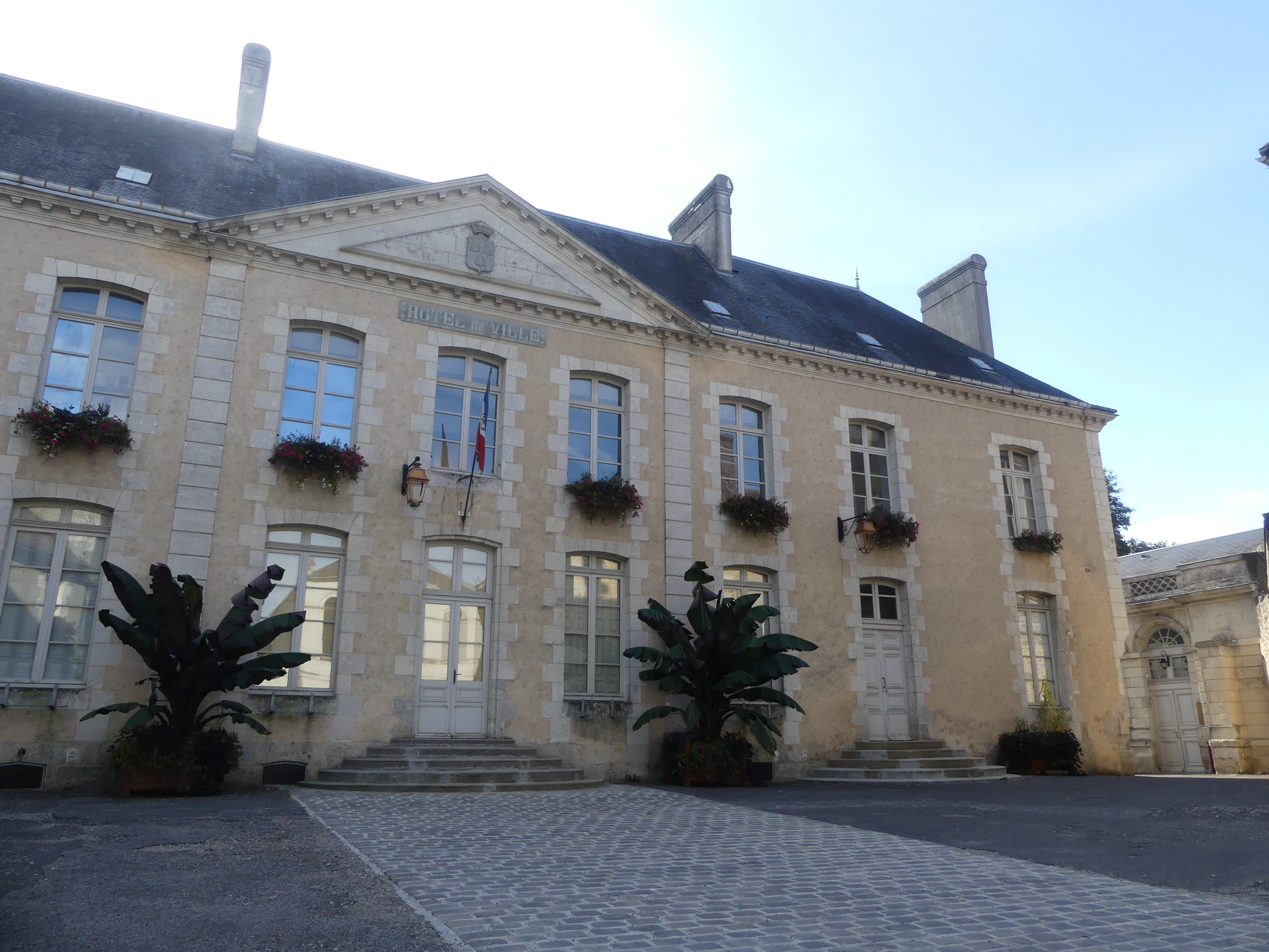 Mairie